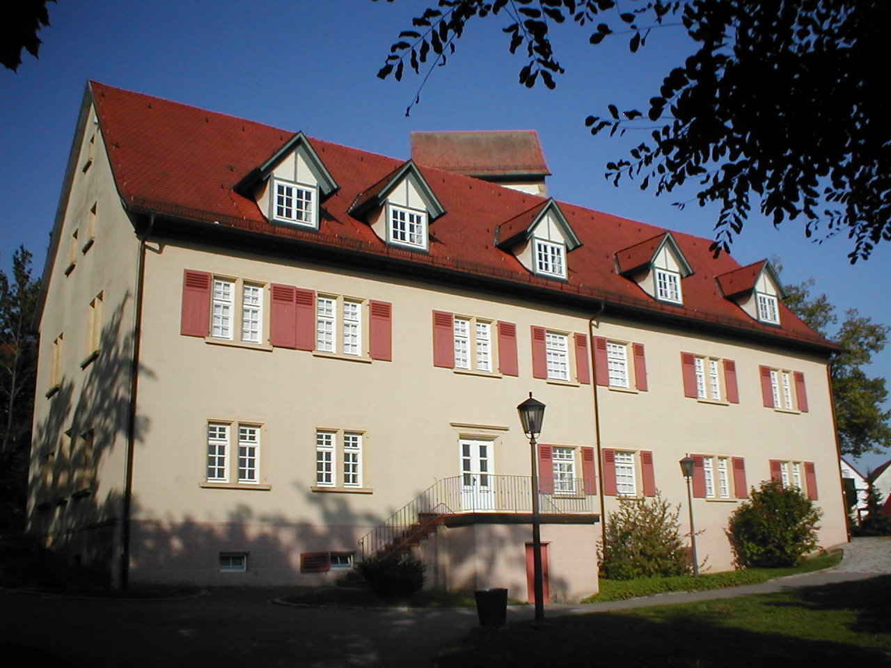 Schloss Neudenau, Ansicht des Hauptgebäudes